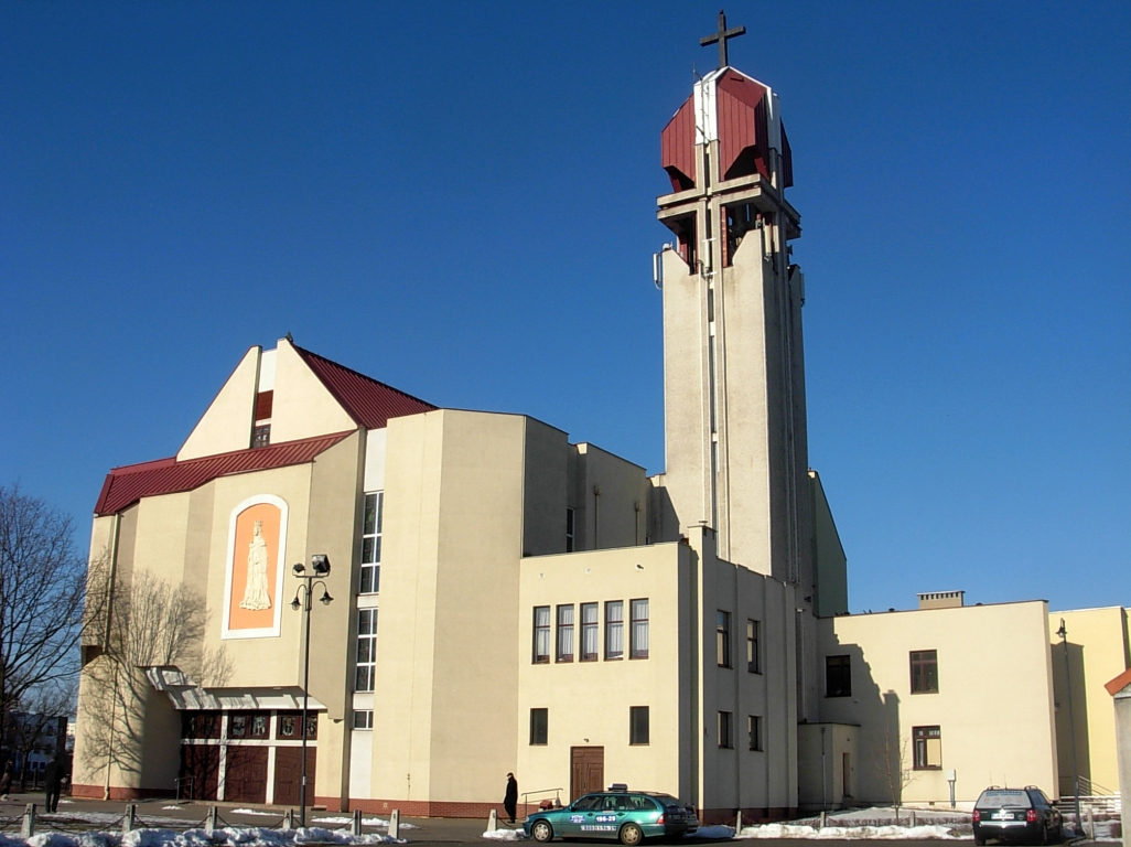 Kościół św. Jadwigi Królowej na osiedlu Wzgórze Wolności w Bydgoszczy